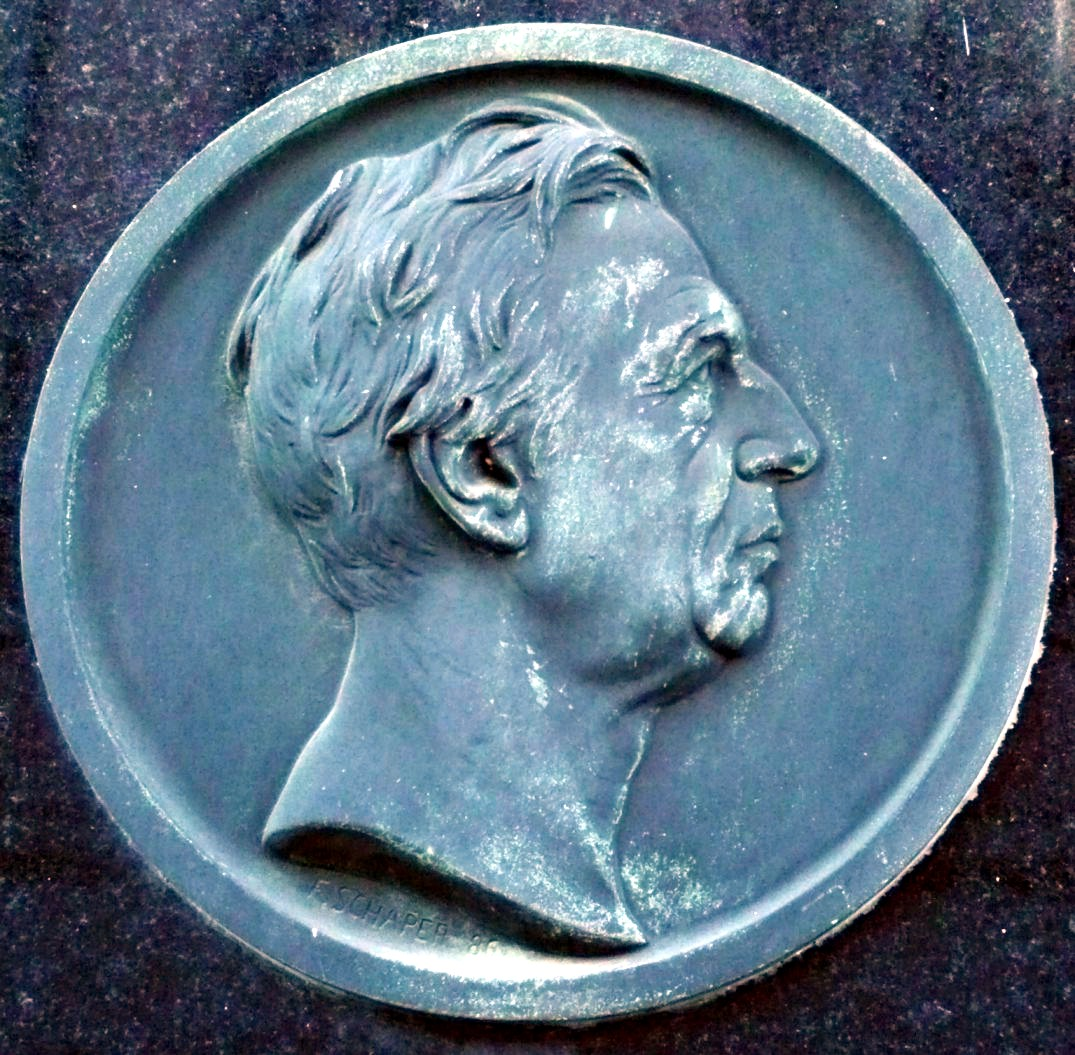 August Eduard Grell, * am 6. November 1800 in Berlin, † am 10. August 1886 ebenda. Reliefbildnis von Fritz Schaper. Ausschnitt von der Gedenktafel an Grells Geburtshaus, Poststraße 12, Nikolaiviertel, in Berlin-Mitte, eingeweiht anlässlich seines 100. Geburtstages im November 1900.